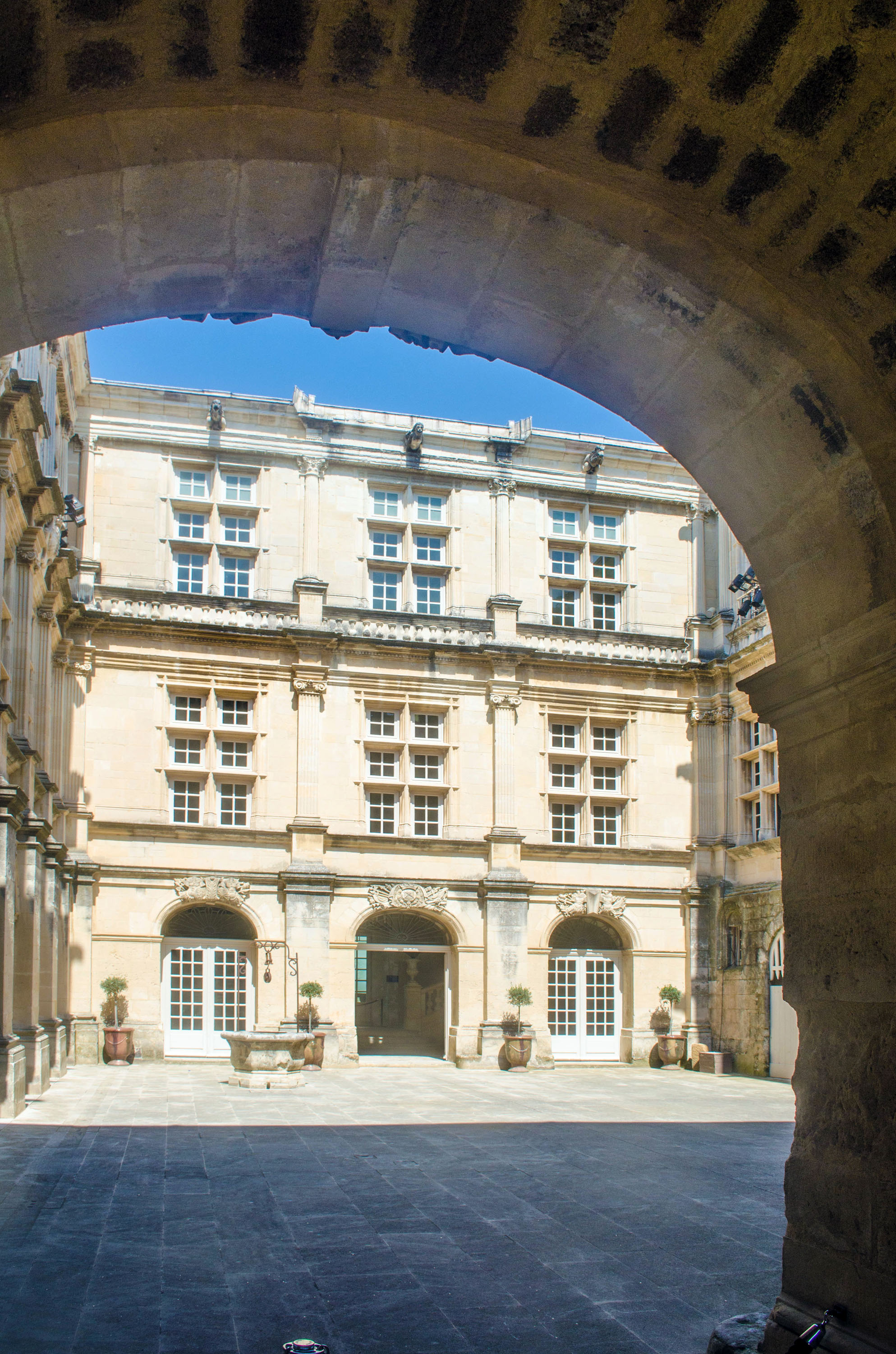 Château de Suze-la-Rousse (Drôme, Rhône-Alpes, France). Cour d'honneur.